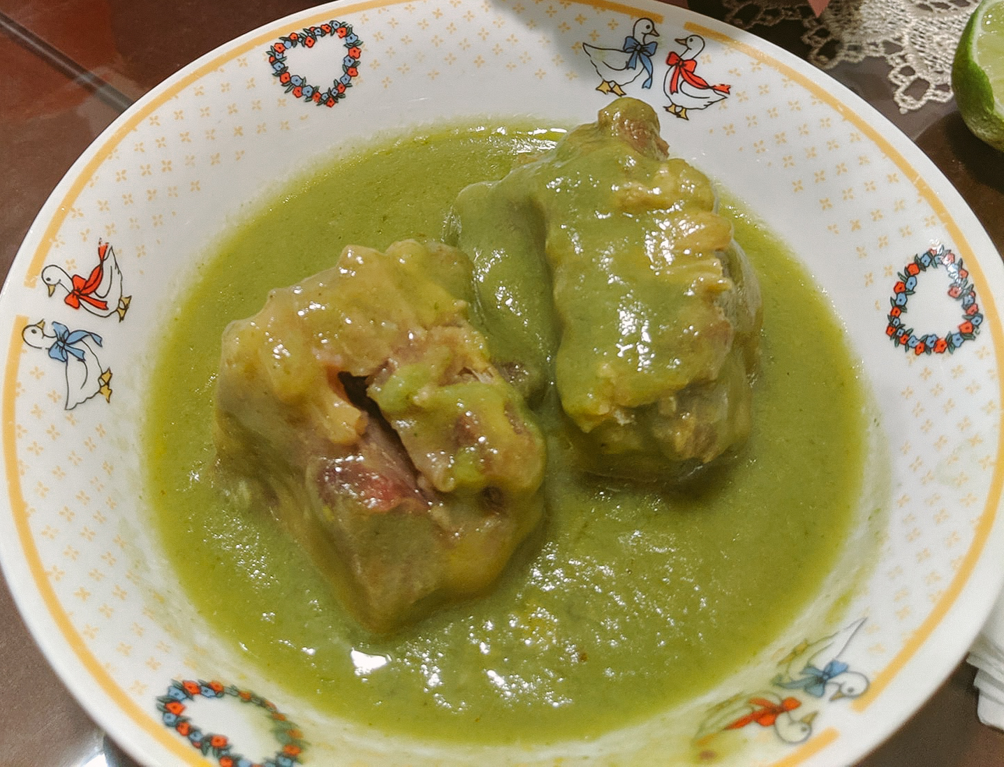 Atapacua verde